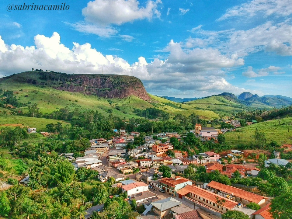 Vista panorâmica